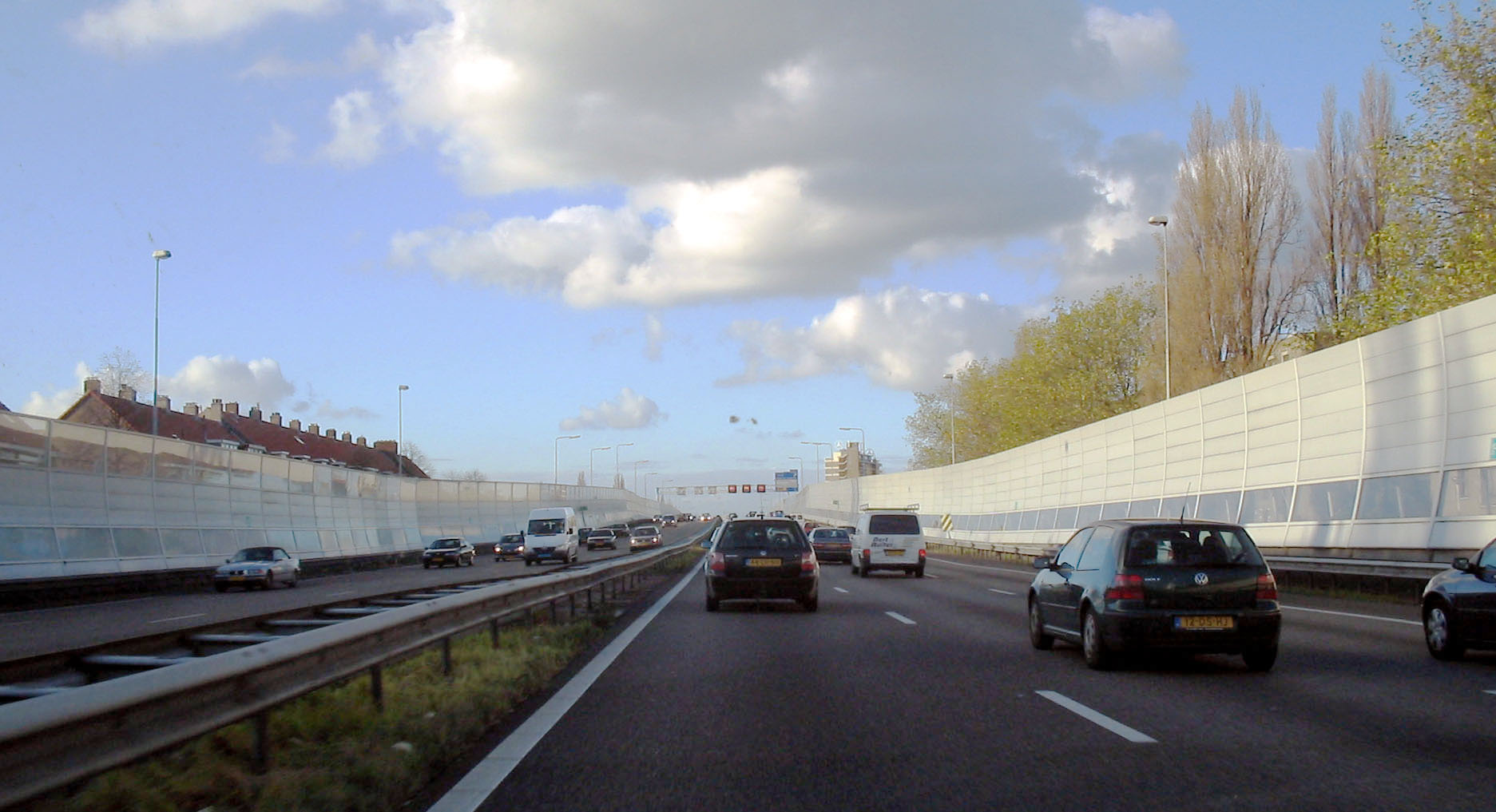 Overschie, A13, 13 november 2005